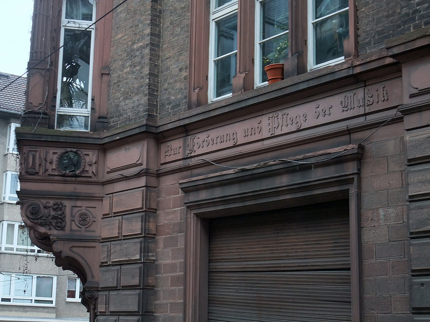 Schottenhof Mainz, Widmung